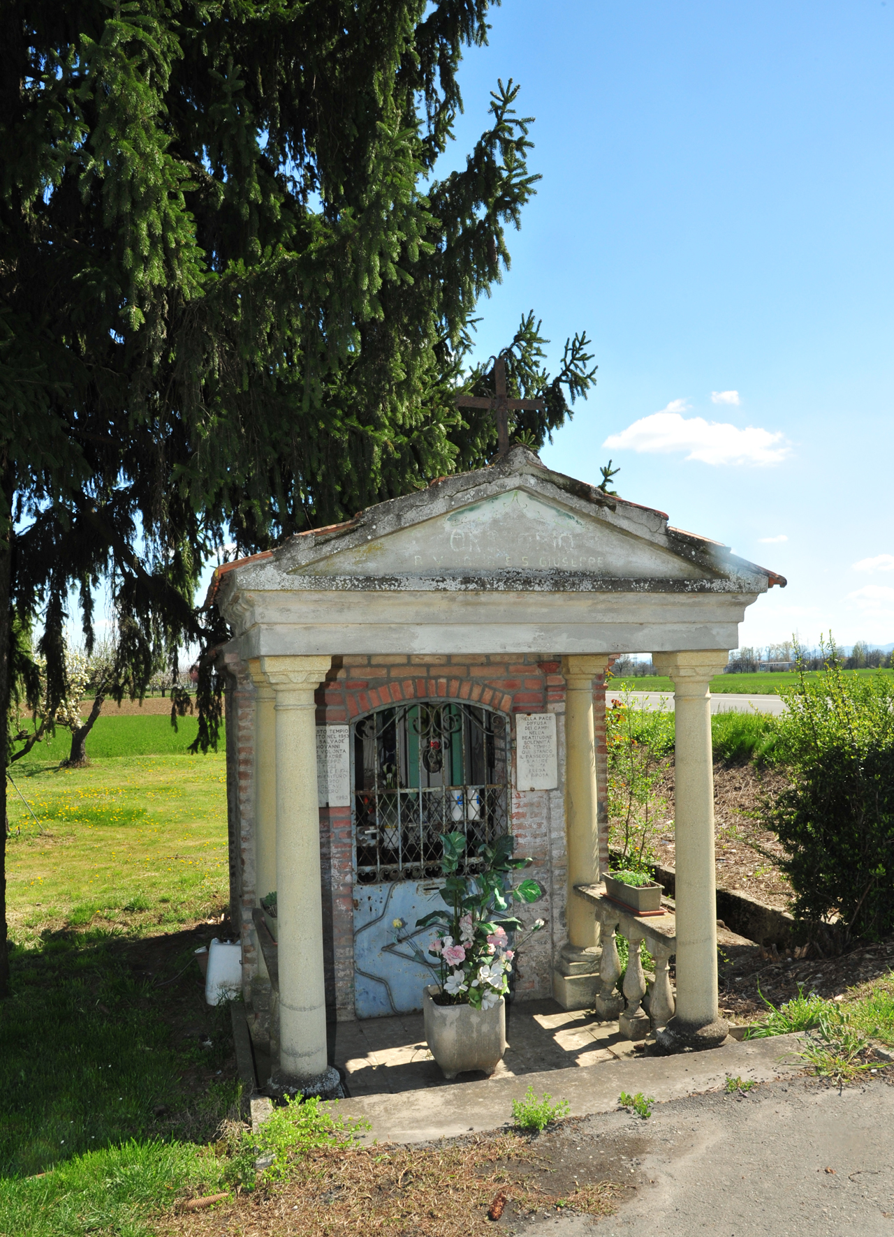 Loc Felina1